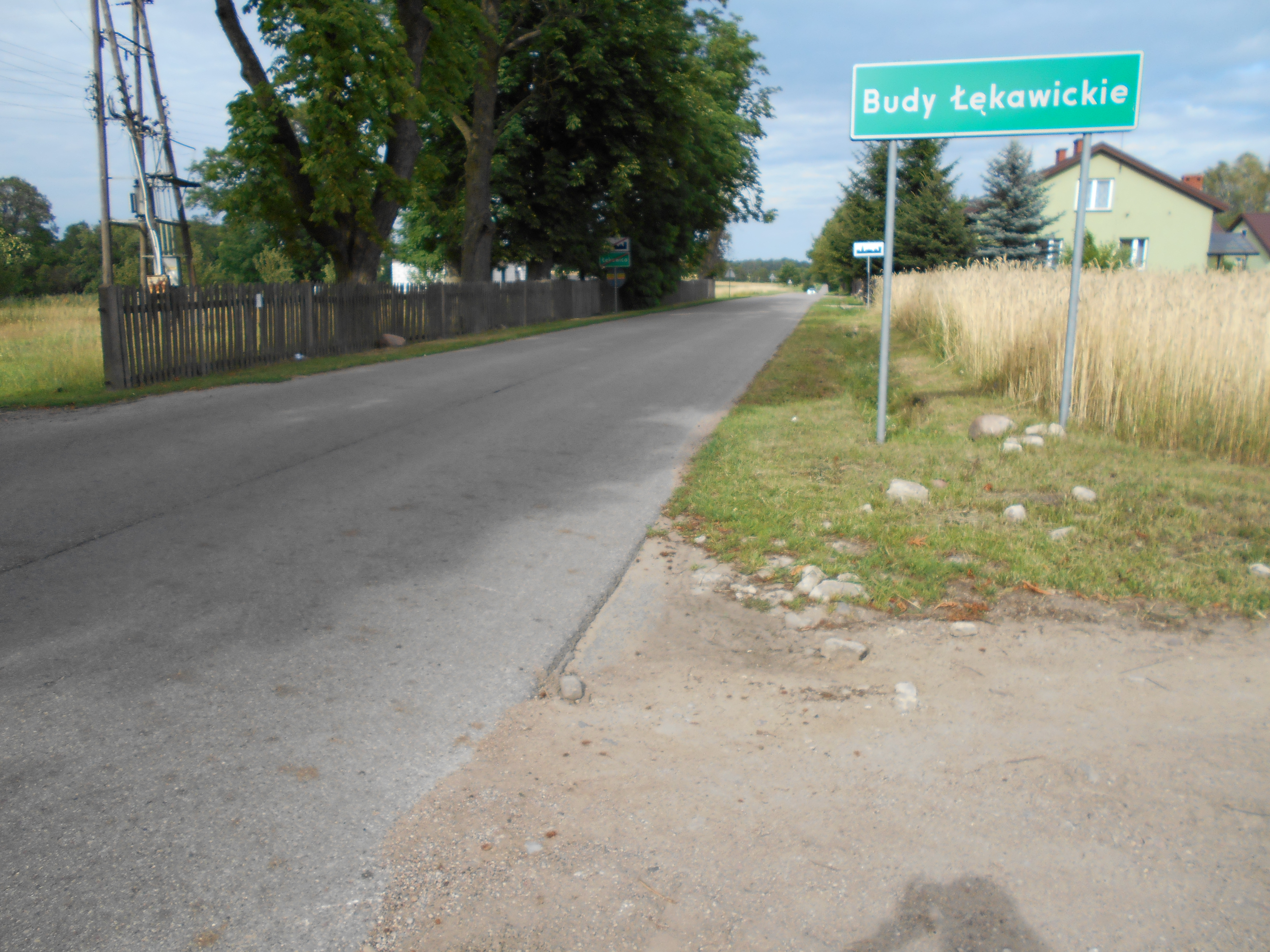 Miejscowość w gminie Siennica